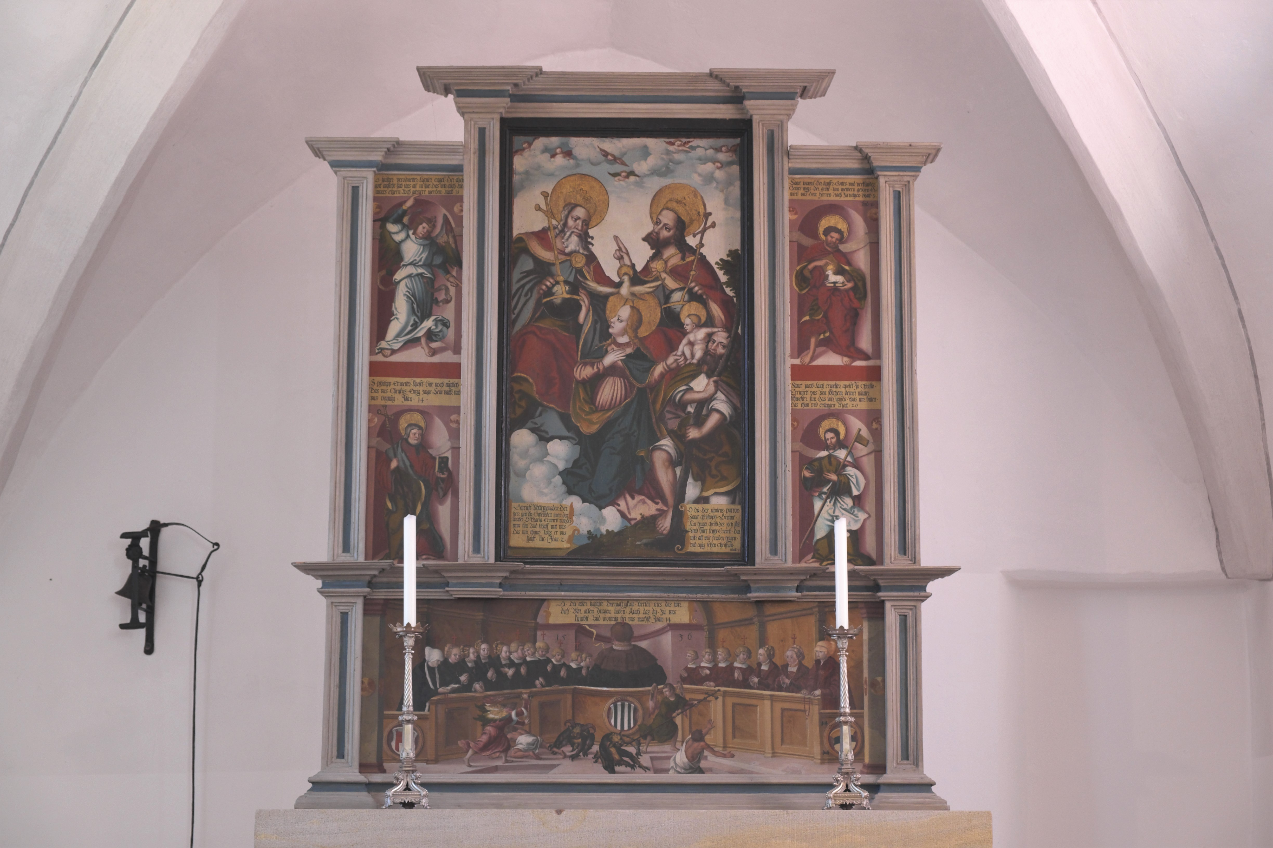 Katholische Filialkirche St. Michael in Hanfeld (Starnberg) (Bayern, Deutschland)